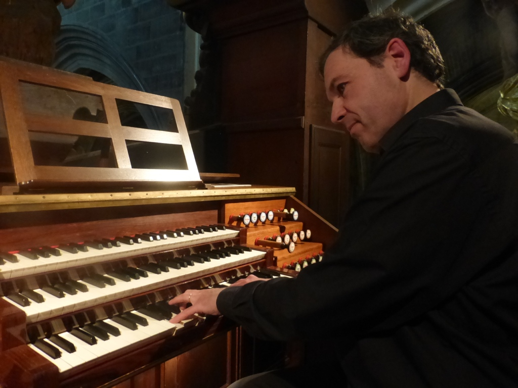 Cette photo montre l'organiste classique Thilo Muster en concert en 2014 à la Basilique St-Michel de Bordeaux